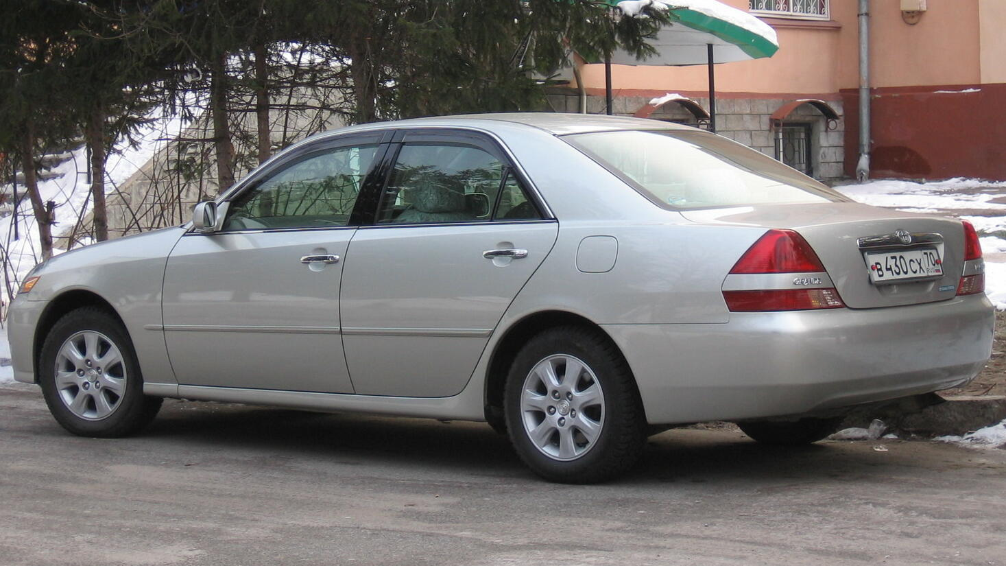 Photo taken in Tomsk, Russia